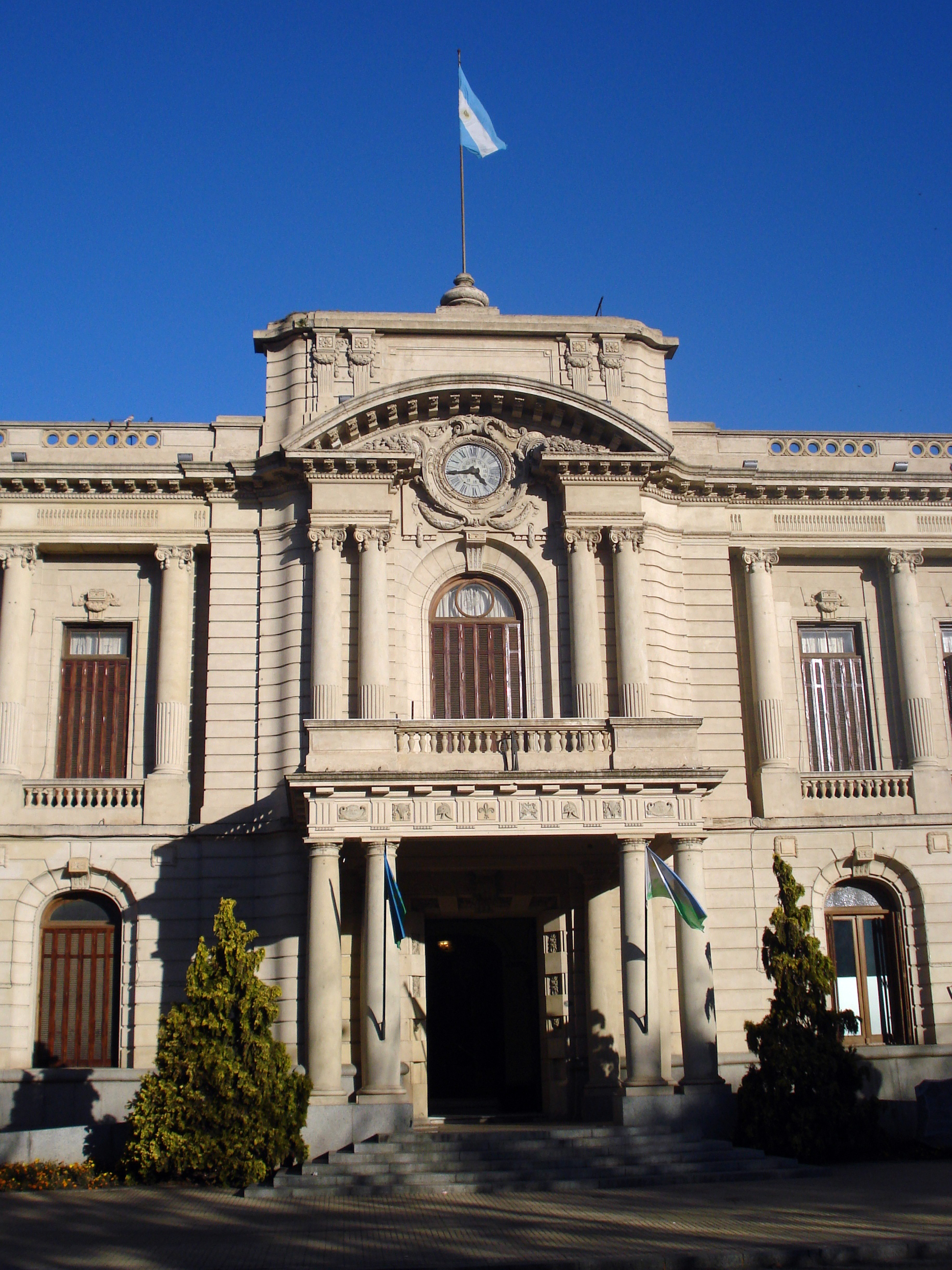 Municipalidad de Tandil, Buenos Aires, Argentina.